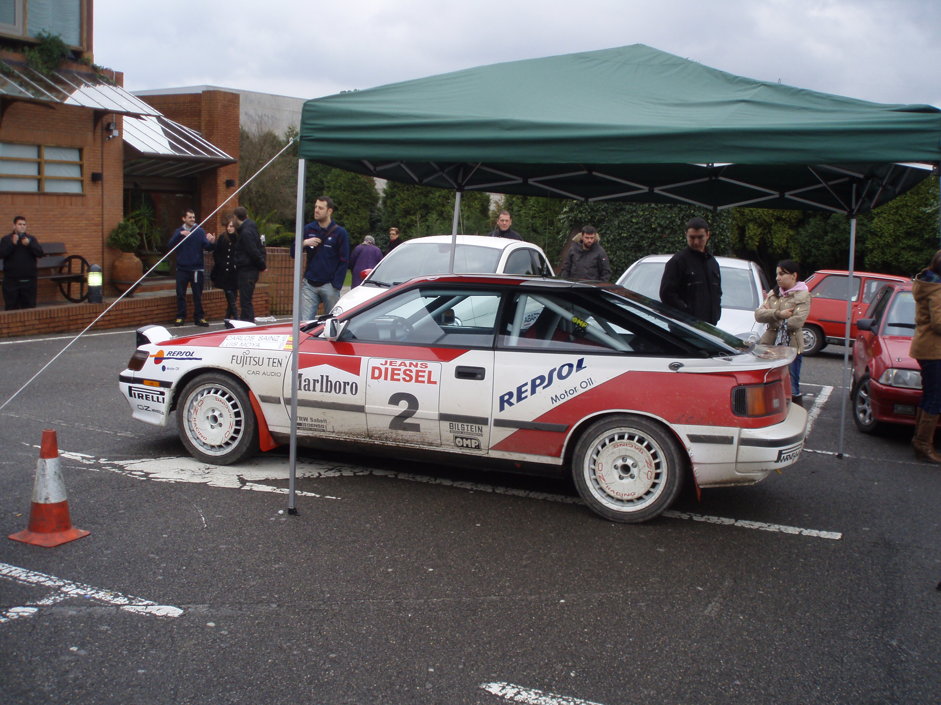 Celica Turbo 4wd Sainz Moya